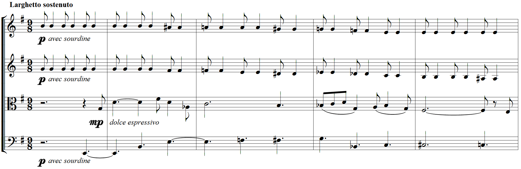 Quintette pour piano et cordes, op.42 de Louis Vierne - début du 2nd mouvement